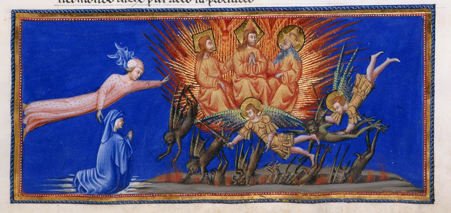 Giovanni di paolo, paradiso 53 caduta degli angeli ribelli.jpg